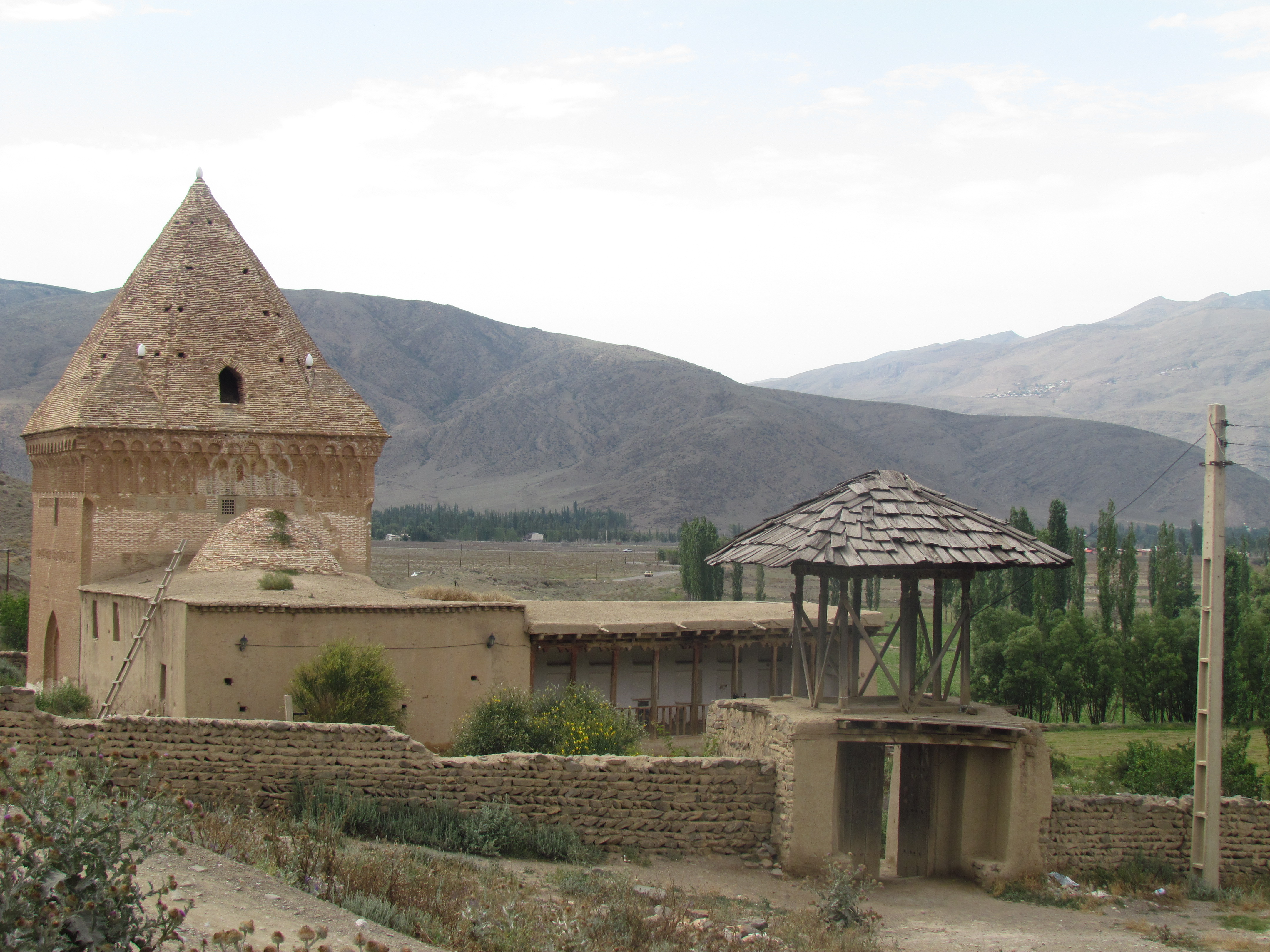 بقعه امامزاده طاهر مطهر و مقبره ملک کیومرث پادوسپانی